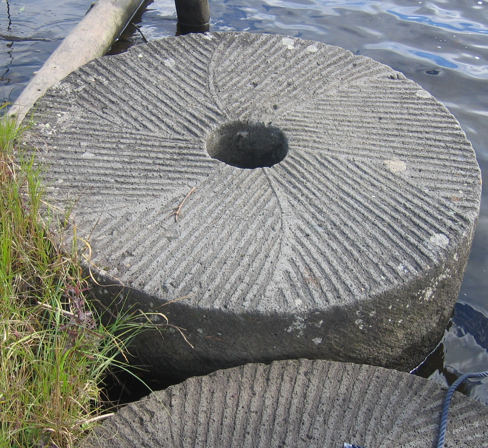 Møllestein, sekundær bruk som brygge